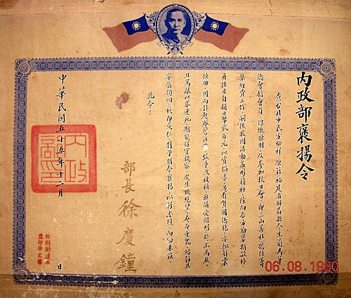 中華民國內政部頒給抗日愛國烈士方幼祥的褒揚令。